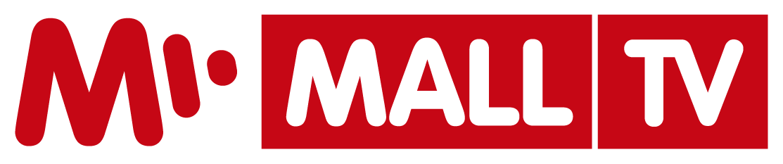 Logo nové internetové televize MALL.TV